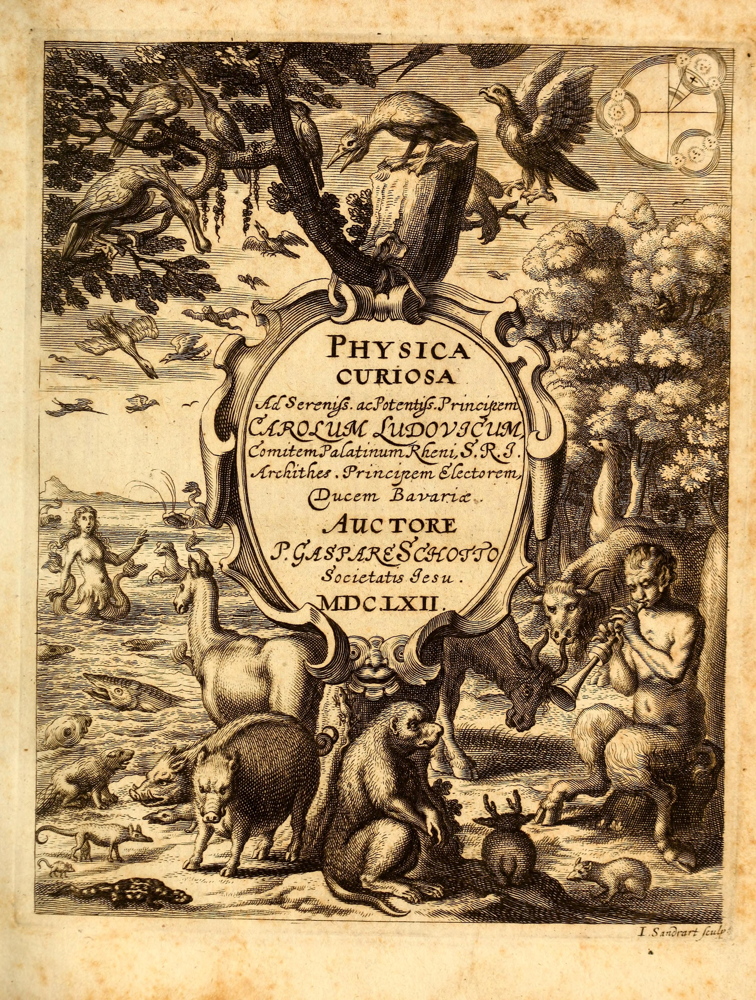 P. Gasparis Schotti, regis curtani ... Physica curiosa, sive, Mirabilia naturæ et artis libris XII. comprehensa : quibus pleraq[ue], quæ de angelis, dæmonibus, hominibus, spectris, energumenis, monstris, portentis, animalibus, meteoris, &c. rara, arcana, curiosaq[ue] circumferuntur, ad veritatis trutinam expenduntur : variis ex historia ac philosophia petitis disquisitionibus excutiuntur, & innumeris exemplis illustrantur ...